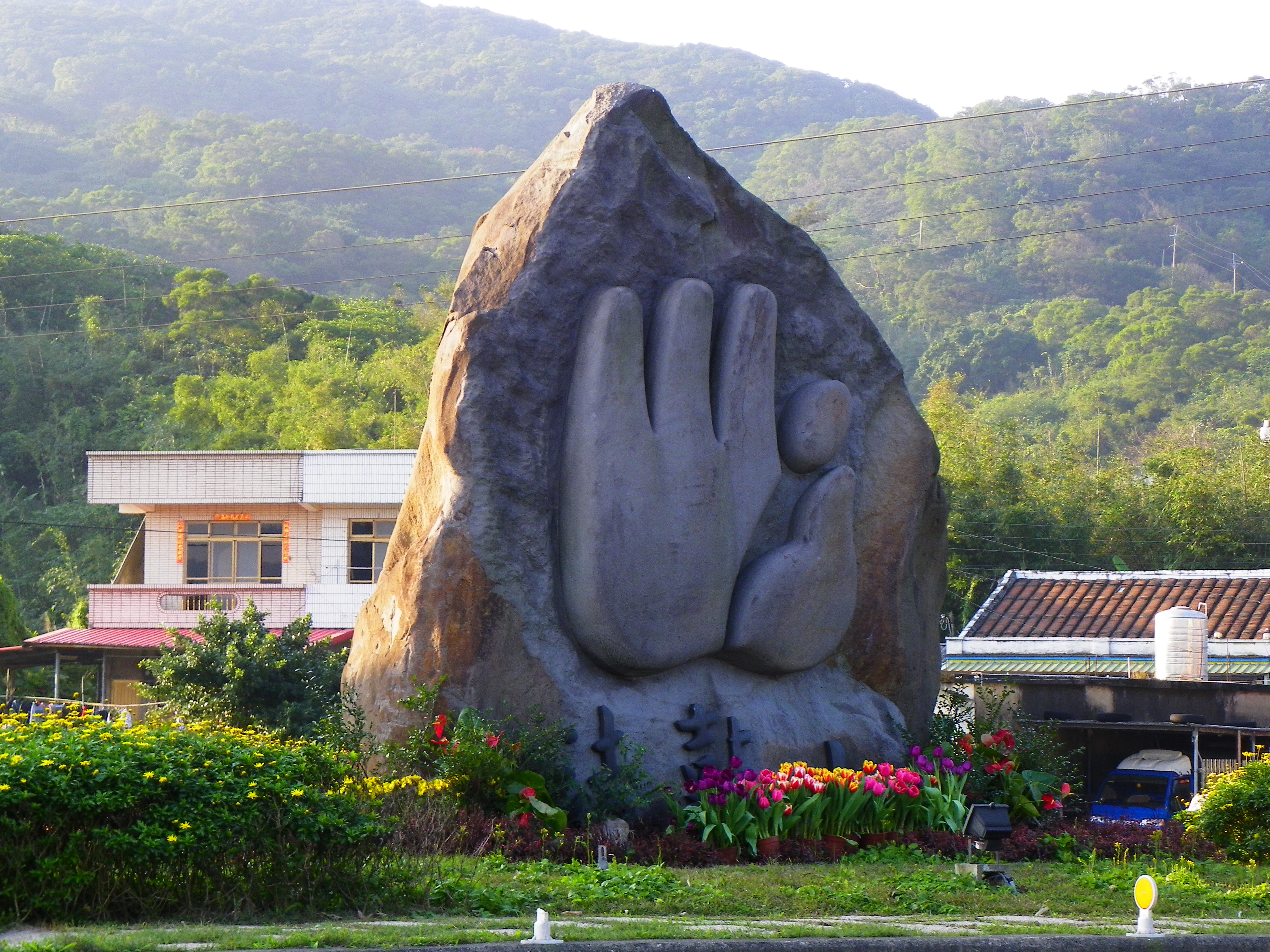 法鼓山入山道路口的山徽石，圖形源自佛陀轉法輪時的說法印。